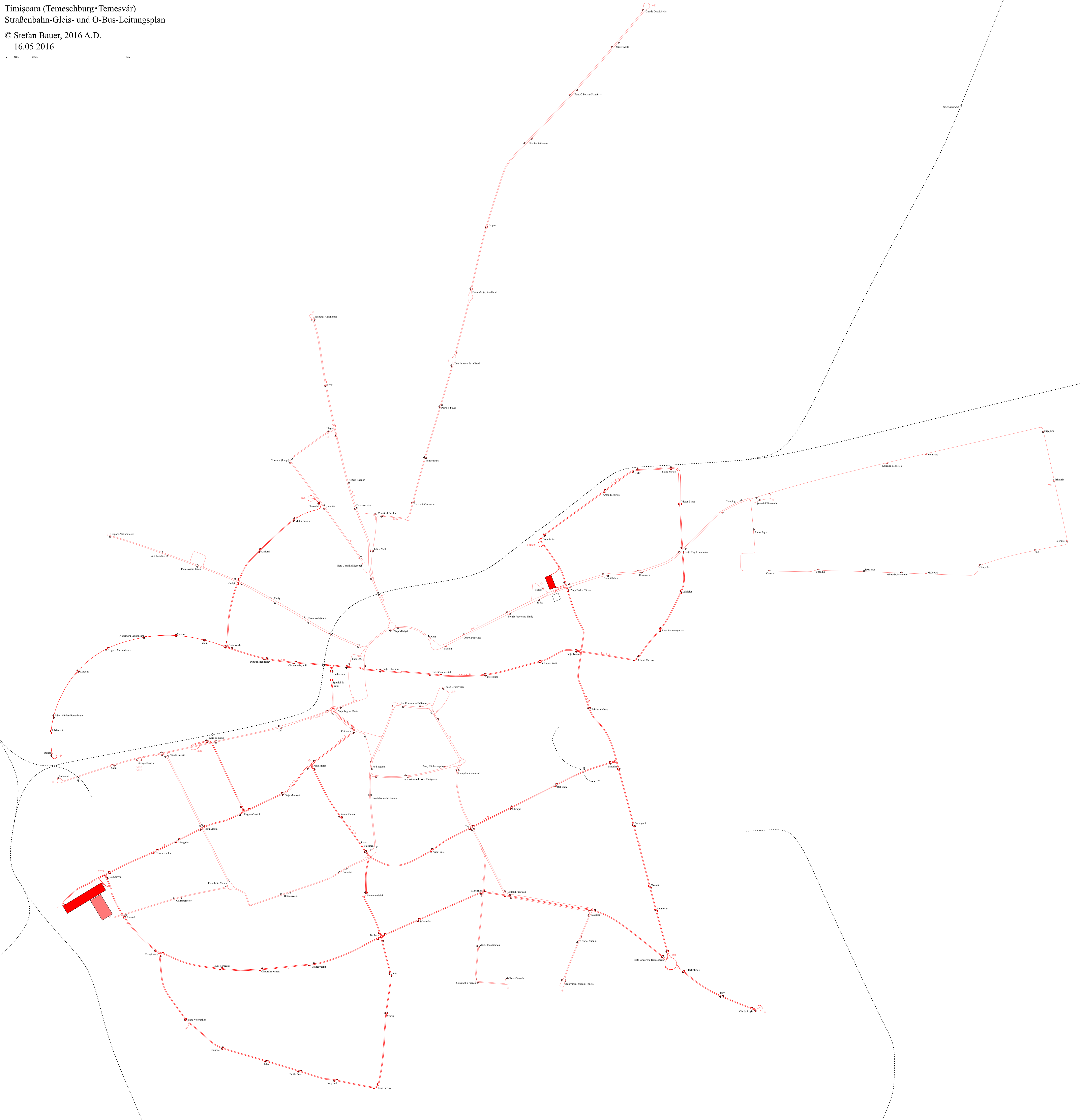 Hartă de linie şi bifilare reţelei tramvaiului şi troleibuzului din Timișoara 2016